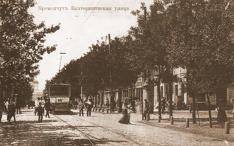 Трамвай на Екатерининской улице в Кременчуге. Вдали виден Успенский собор (позже был разрушен).